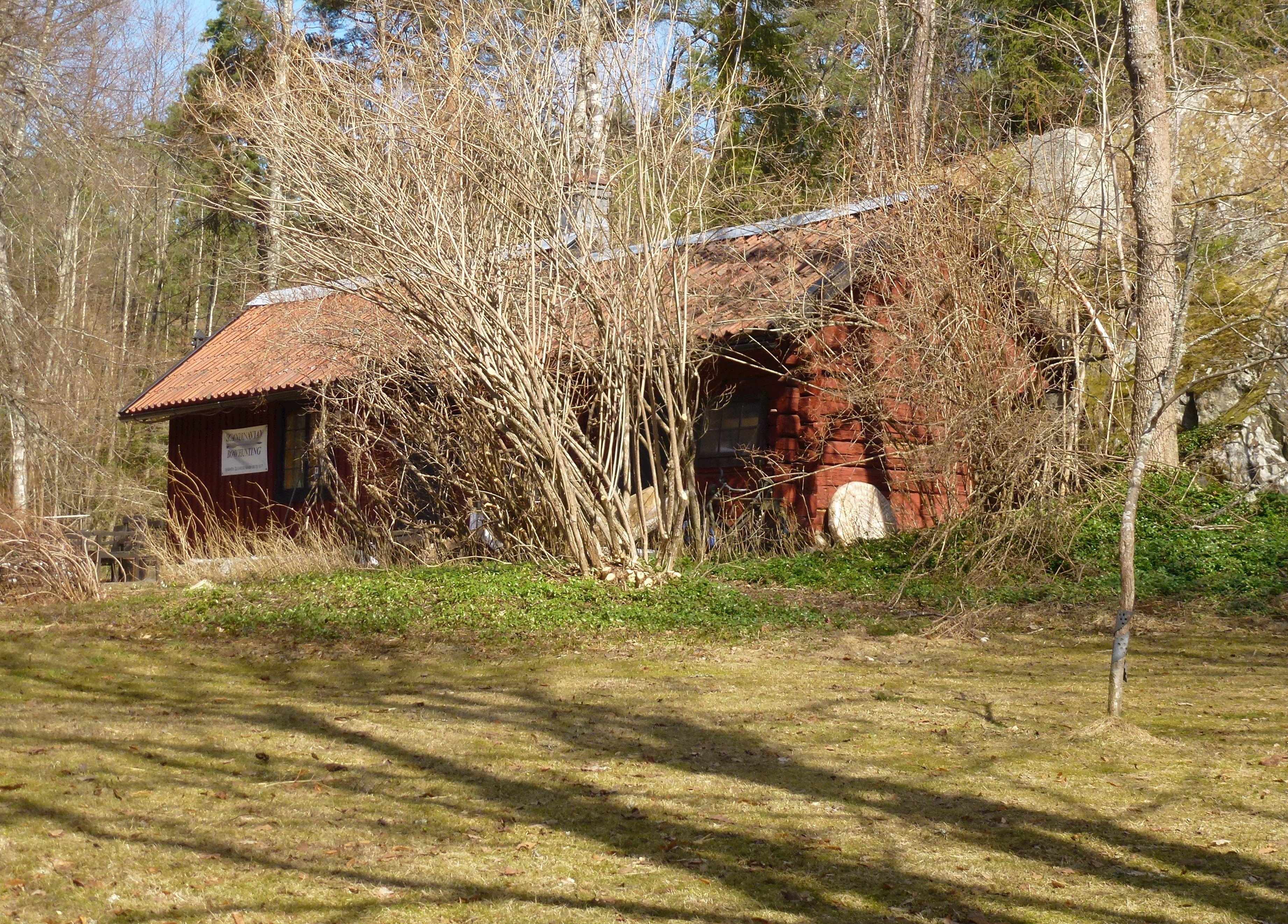 Villa Masmo, Masmotorpet, Huddinge kommun